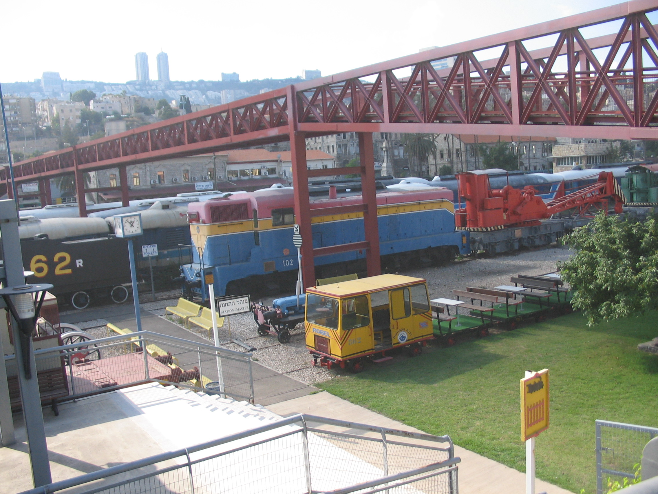 חצר מוזיאון הרכבת, בתחנת רכבת חיפה-מזרח, חיפה 2006.